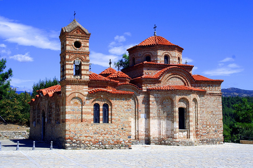 Saint_nikolas_serres.jpg